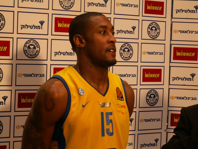 וויל סולומון, מתראיין אחרי משחק יורוליג צולם על-ידי אבי קדמי This picture was taken by Avi Kedmi